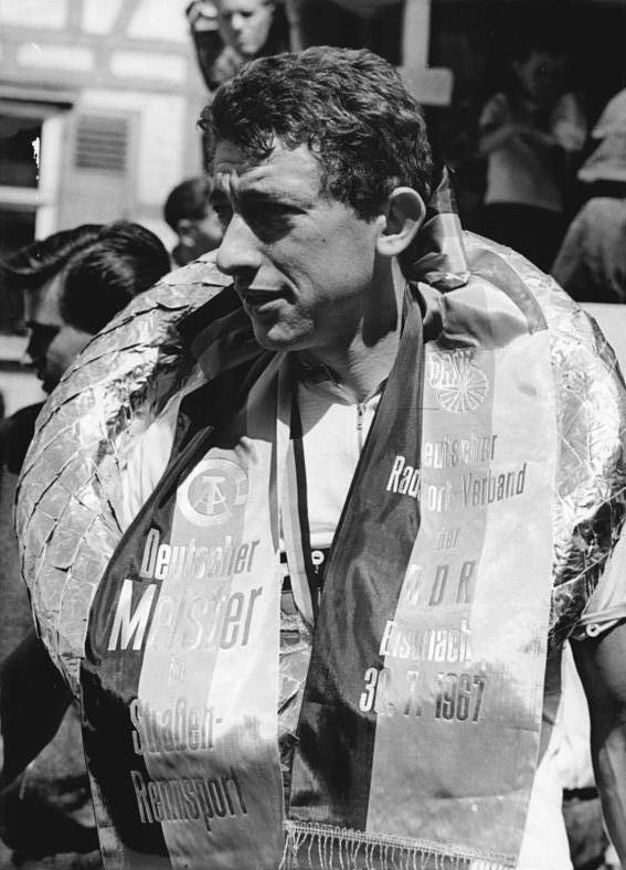 Dieter Grabe Zentralbild Demme (bi) 31.7.1967 Eisenach: Dieter Grabe Sieger der diesjährigen deutschen Straßenmeisterschaft im Radrennsport. Nach einem schweren Kampf erspurtete sich Dieter Grabe (SC DHfK Leipzig) mit 4:28:45 den Meistertitel.